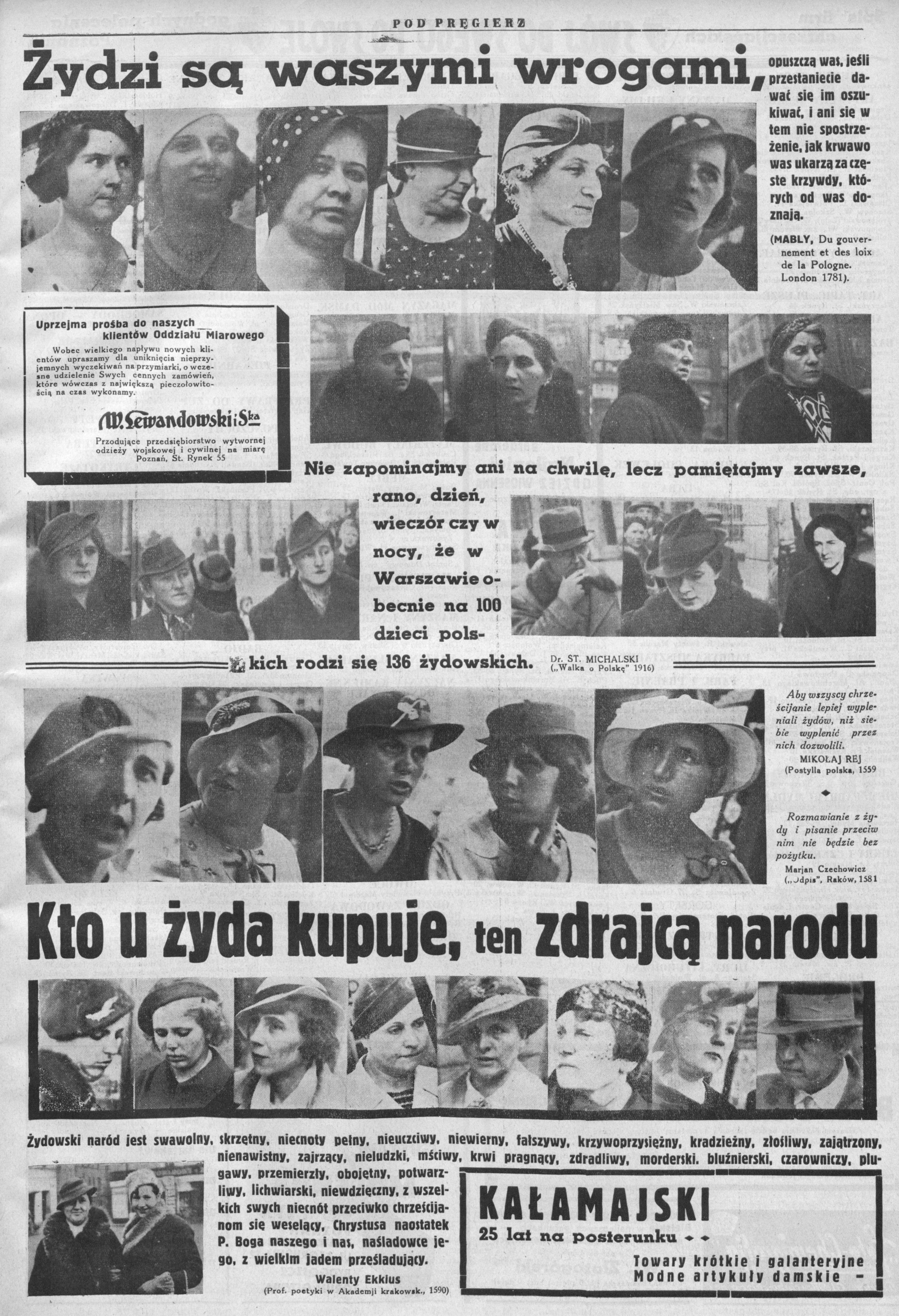 Wycinek z dziennika „Pod Pręgierz”, 1937 r. pt. „Kto u Żyda kupuje, ten zdrajcą narodu”